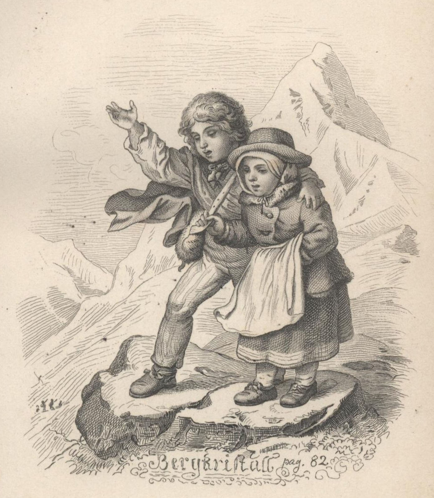 Illustration Ludwig Richters zu Adalbert Stifters Erzählung Bergkristall